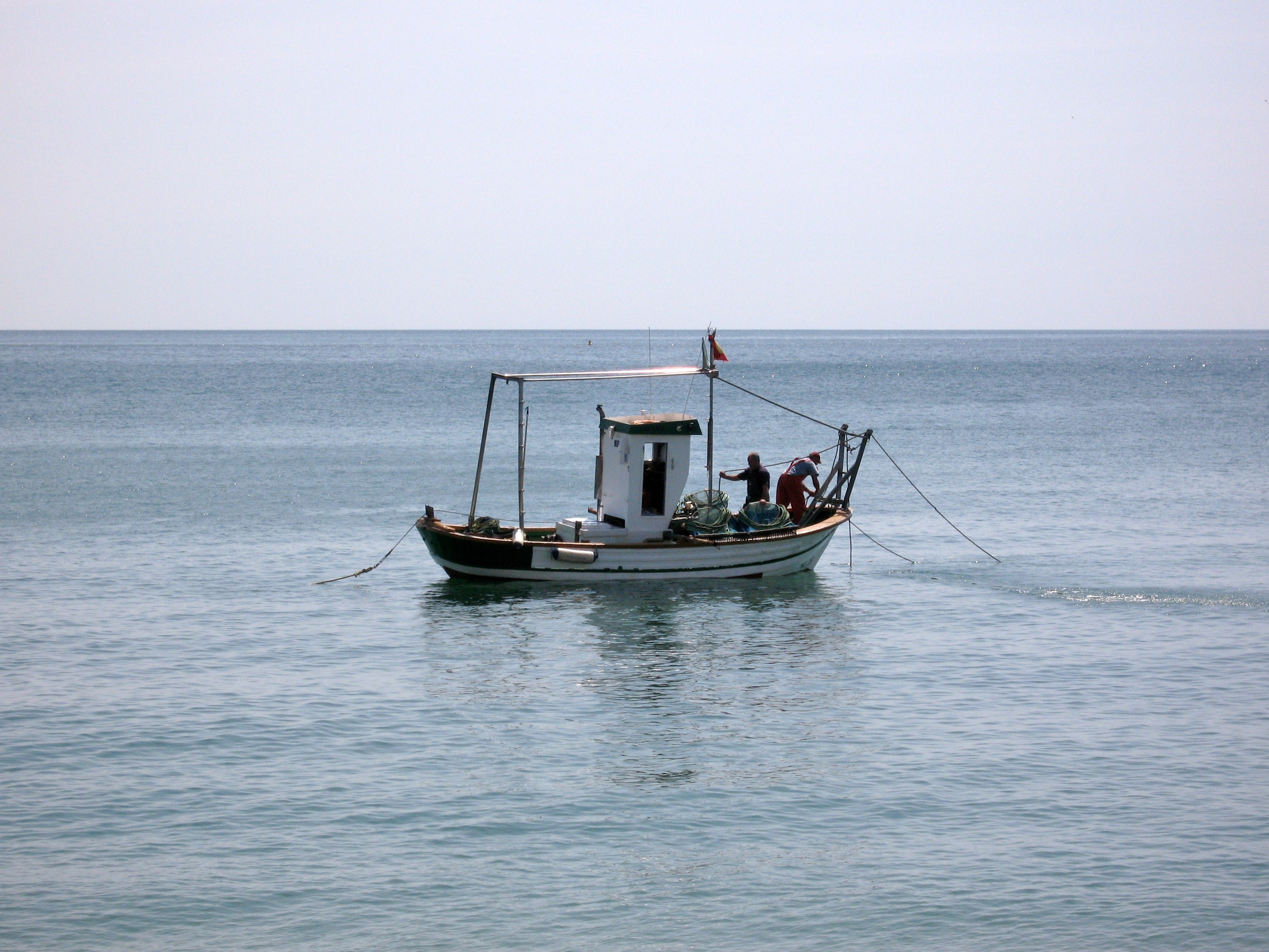 Fischerboot vor dem Strand von Fuengirola, Provinz Málaga, Andalusien, Spanien